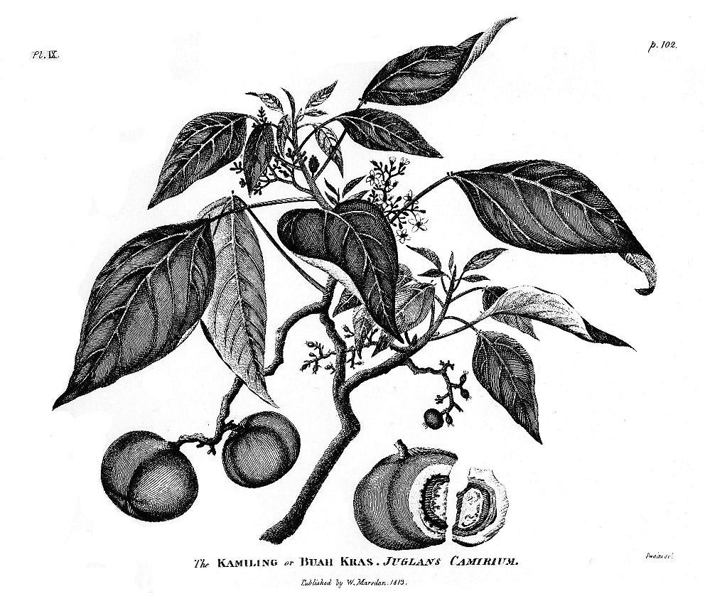 Kamiling